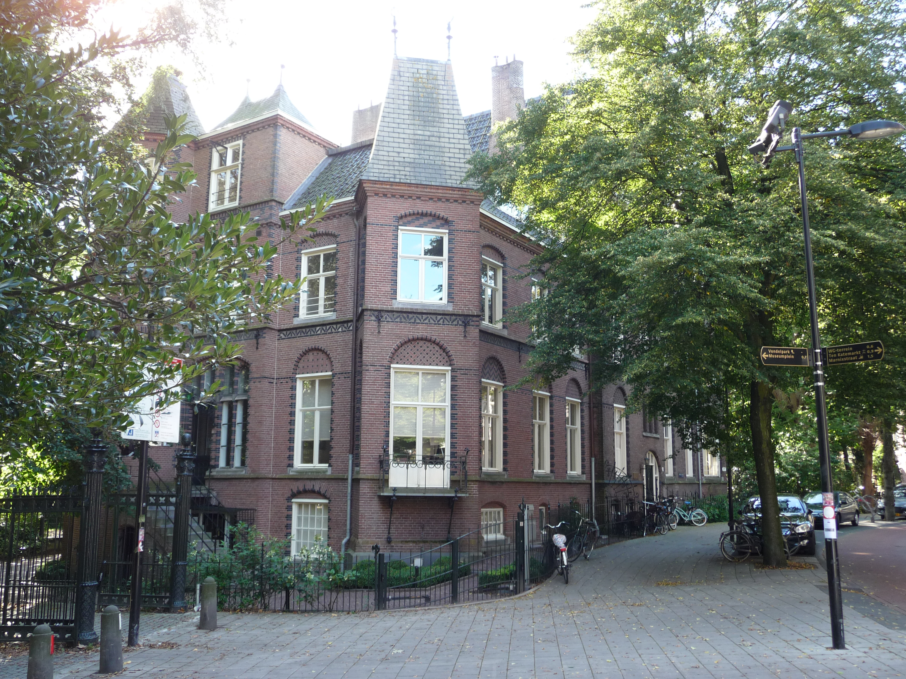 Rijksmonument Vondelstraat 73, Amsterdam